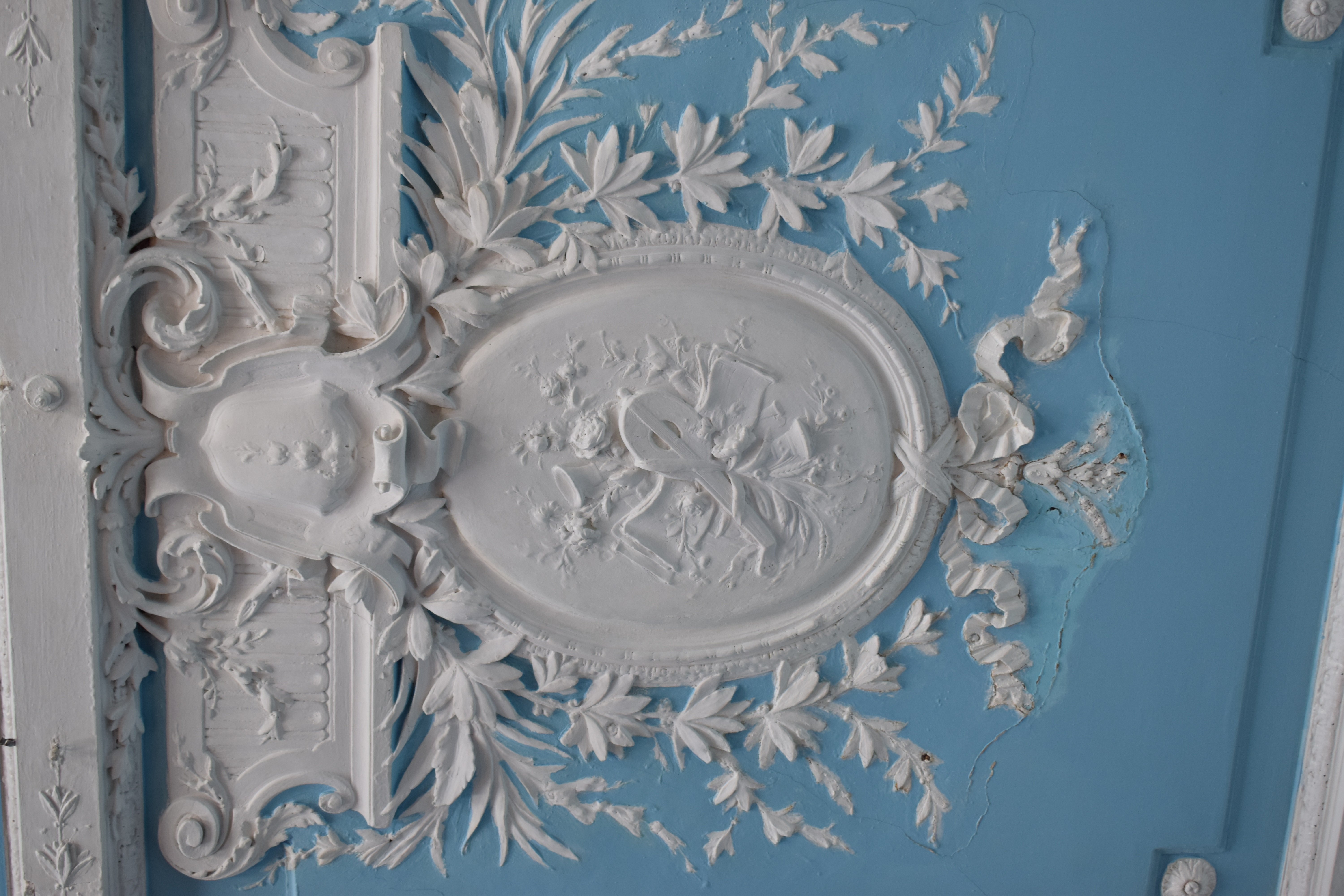 Особняк Локалова